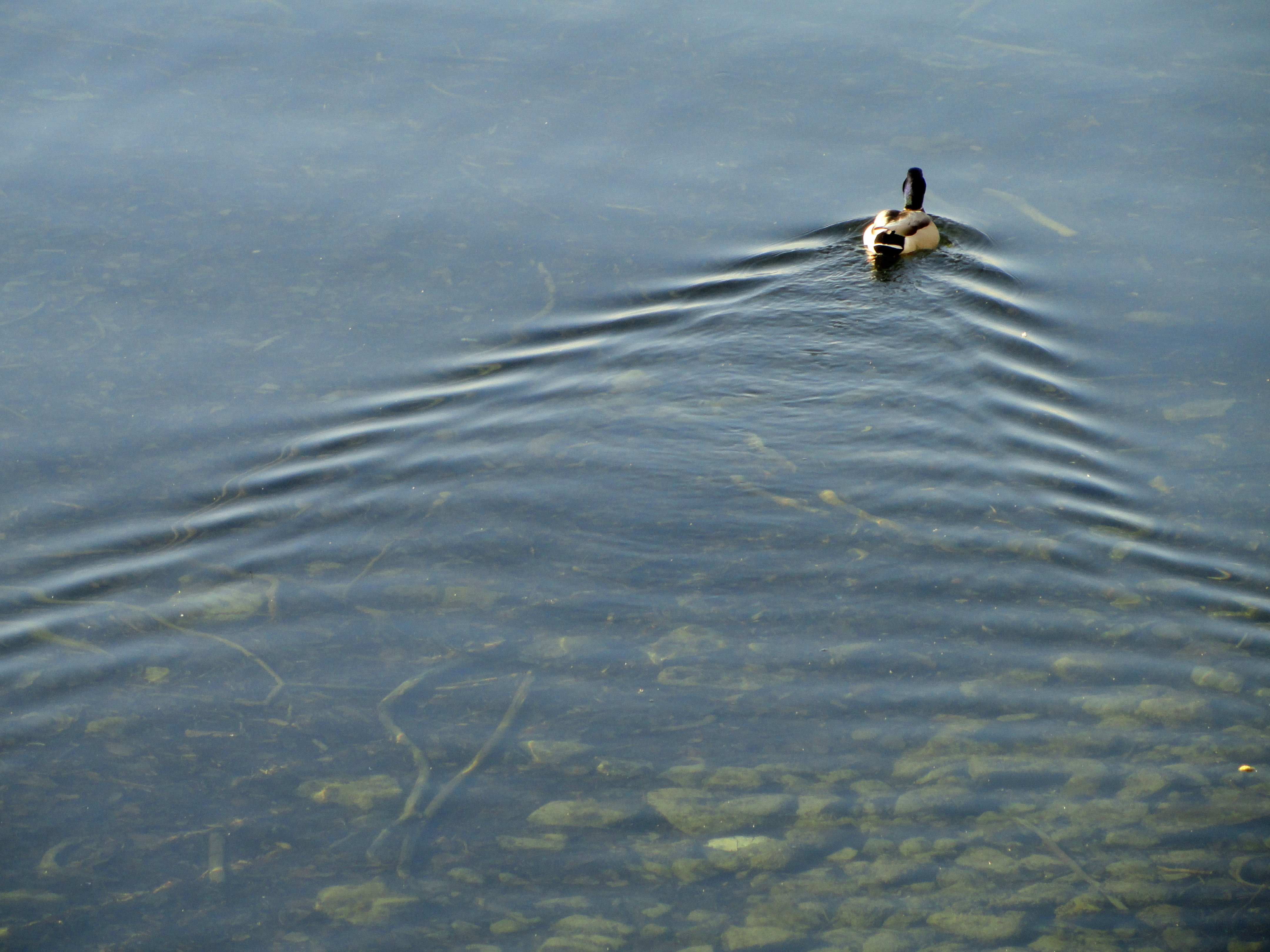 Bodensee at Bad Schachen, Lindau, Germany.